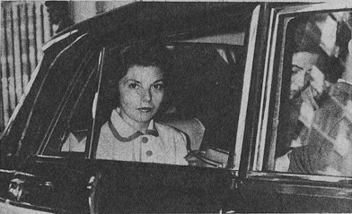 Isabel Martínez de Perón durante su primer viaje a la Argentina, finales de 1965.